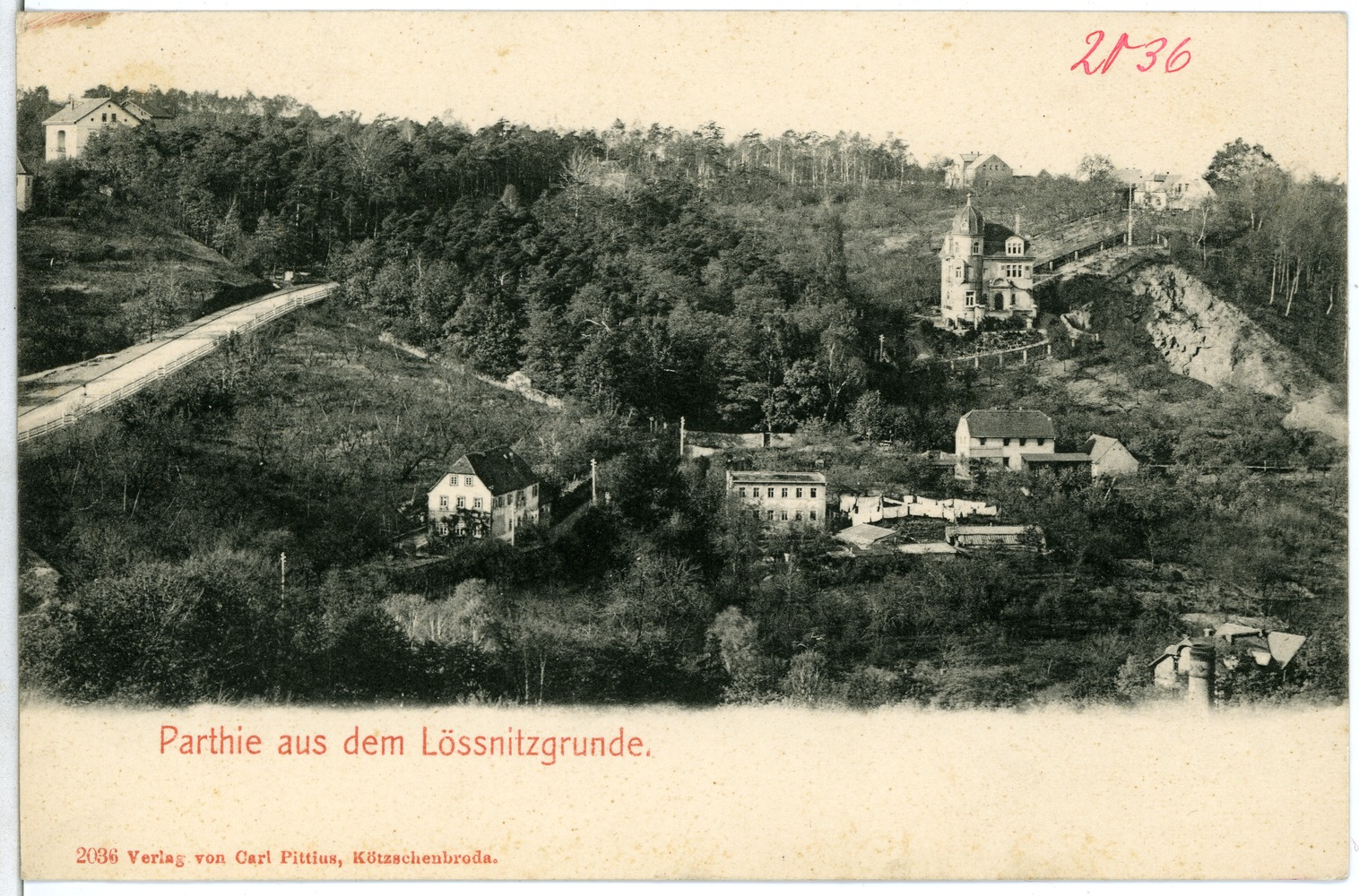 Lößnitzgrund; Partie This postcard is from publisher Brück & Sohn in Meißen ( postcard has a unique number 02036 and is available in a higher resolution at the publisher. This images was uploaded in a cooperation project between Wikipedians and the publisher.